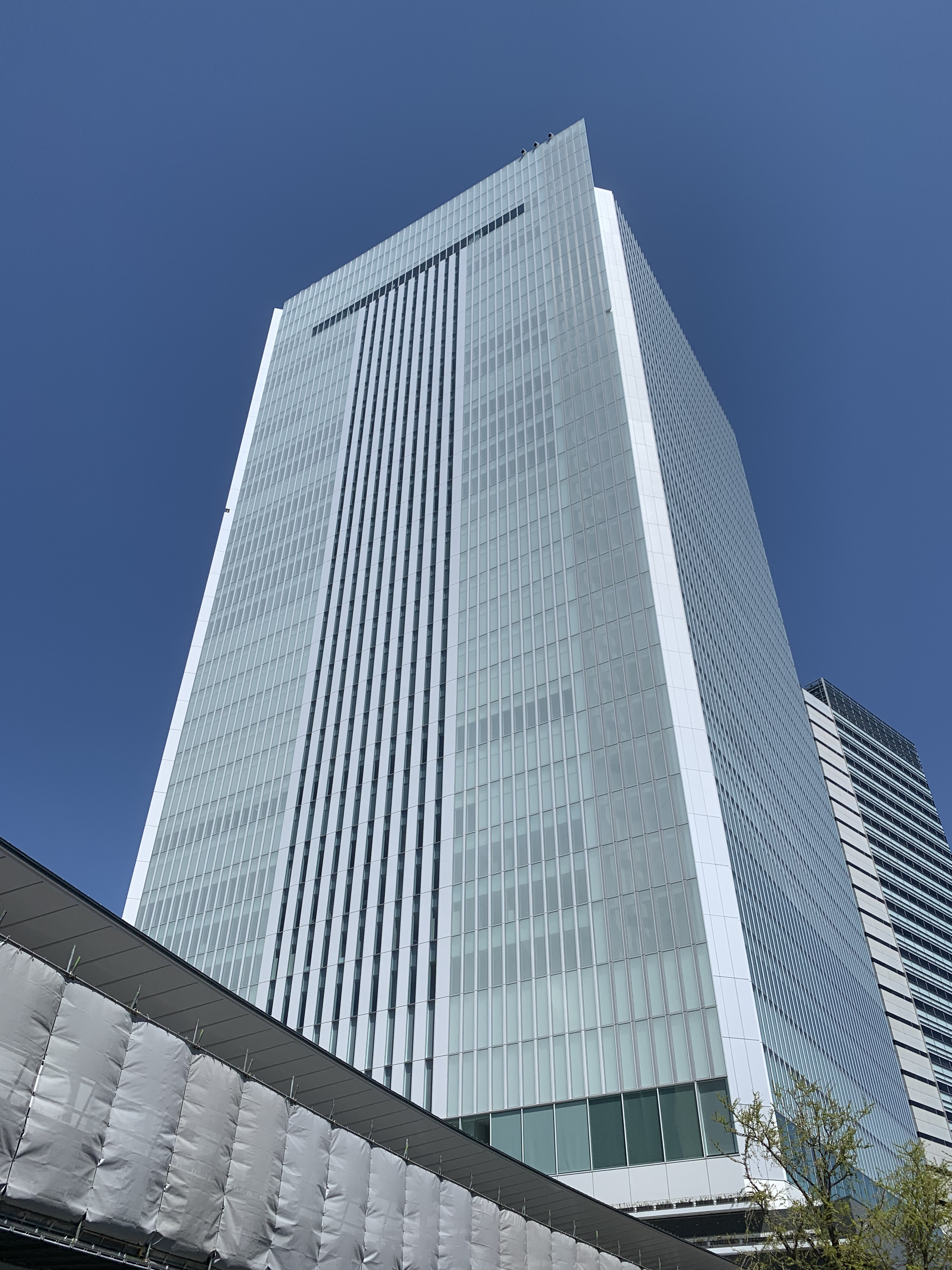 横浜市本庁舎外観